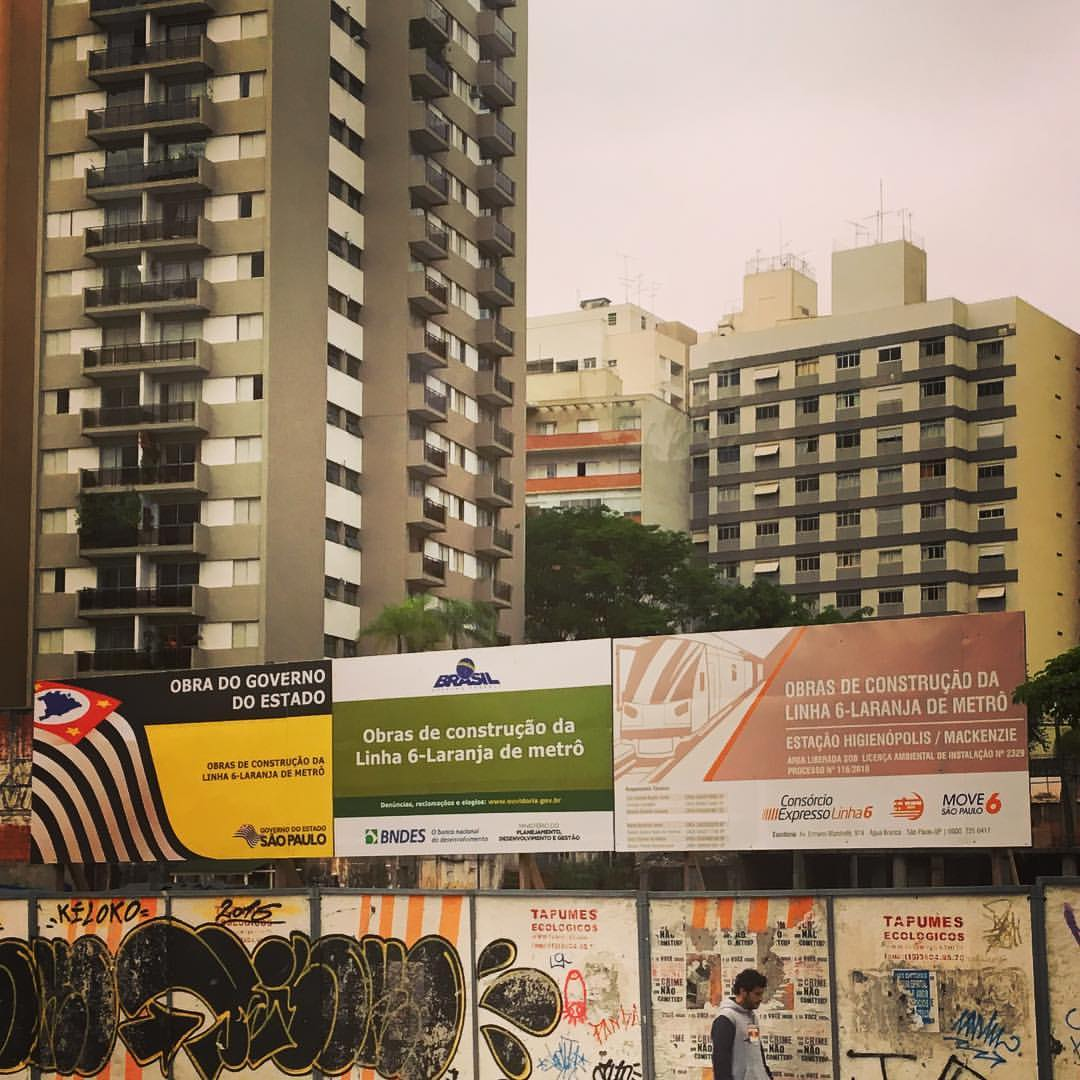 construção da Estação Higienópolis-Mackenzie da Linha 6 Laranja